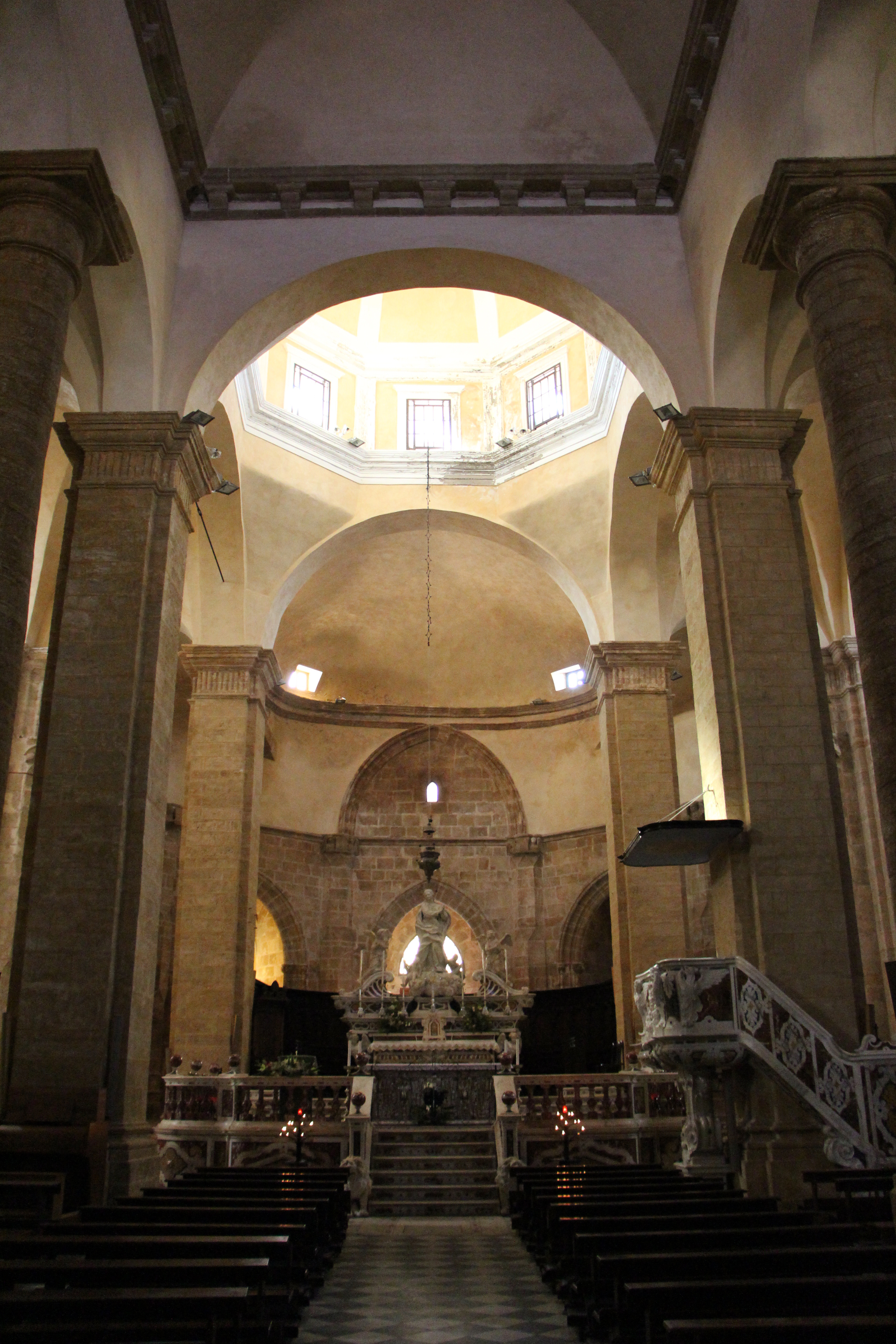 chiese di Alghero, Italia